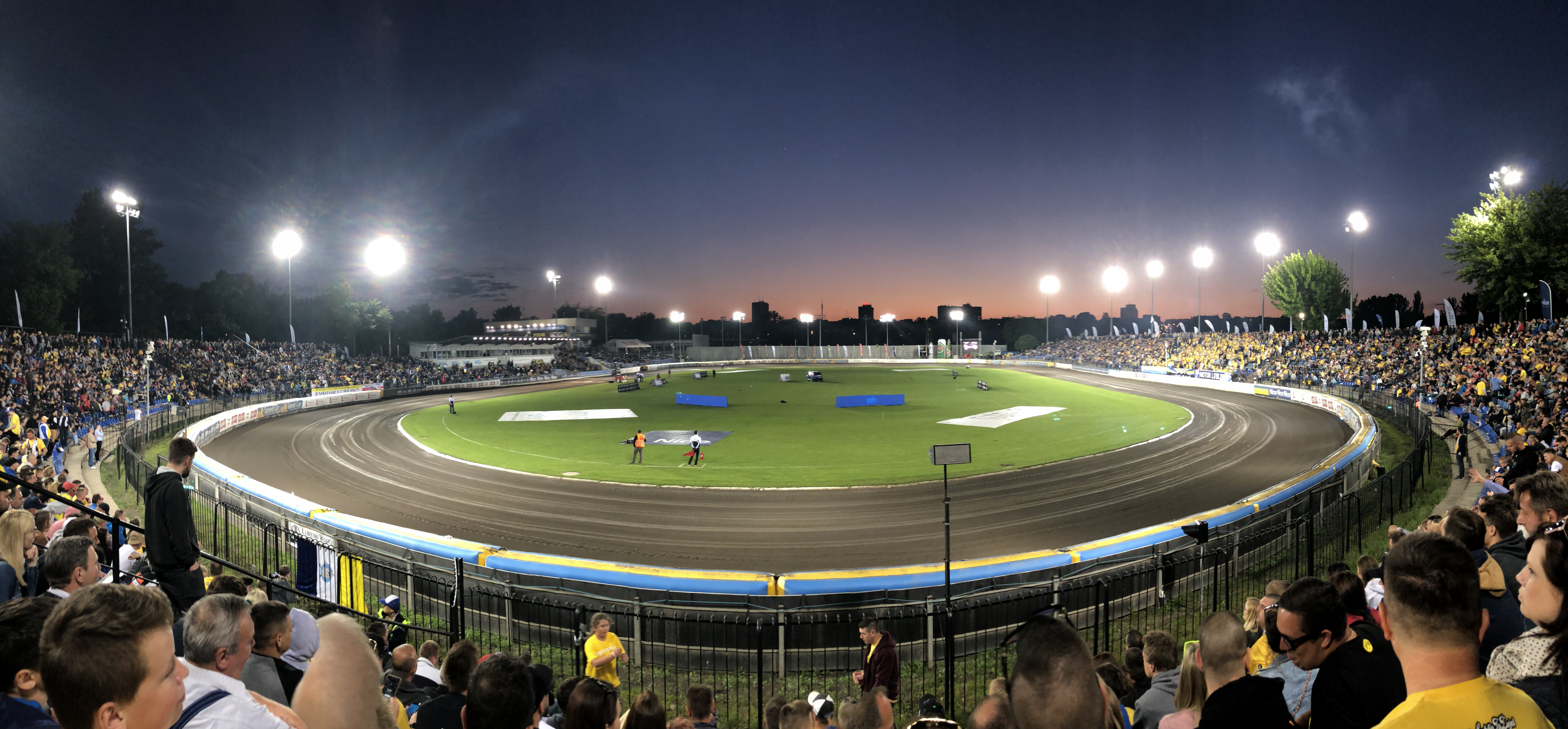 Al. Zygmuntowskie, Motor Lublin - Wanda Kraków, 20 maja 2018